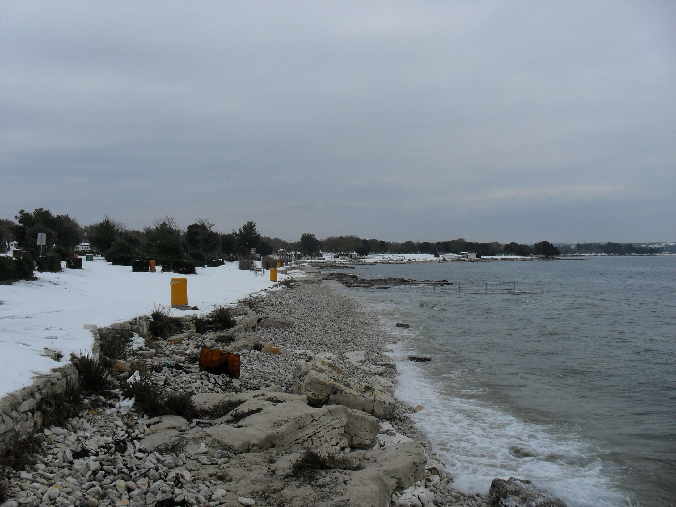 ulika 21 12 09 sneeuw/Schnee/snow